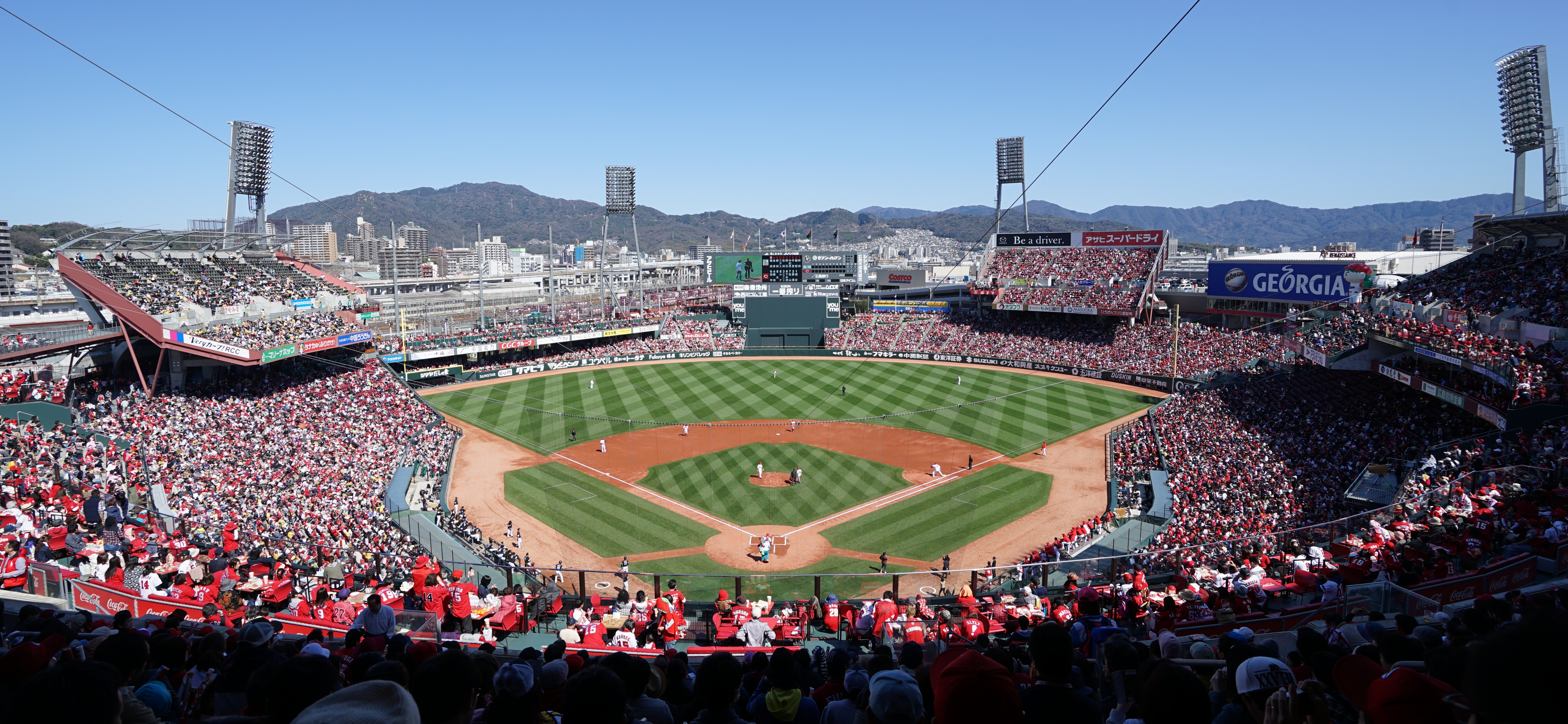 2016年3月21日、広島市民球場（マツダスタジアム）２階スタンドより本人撮影